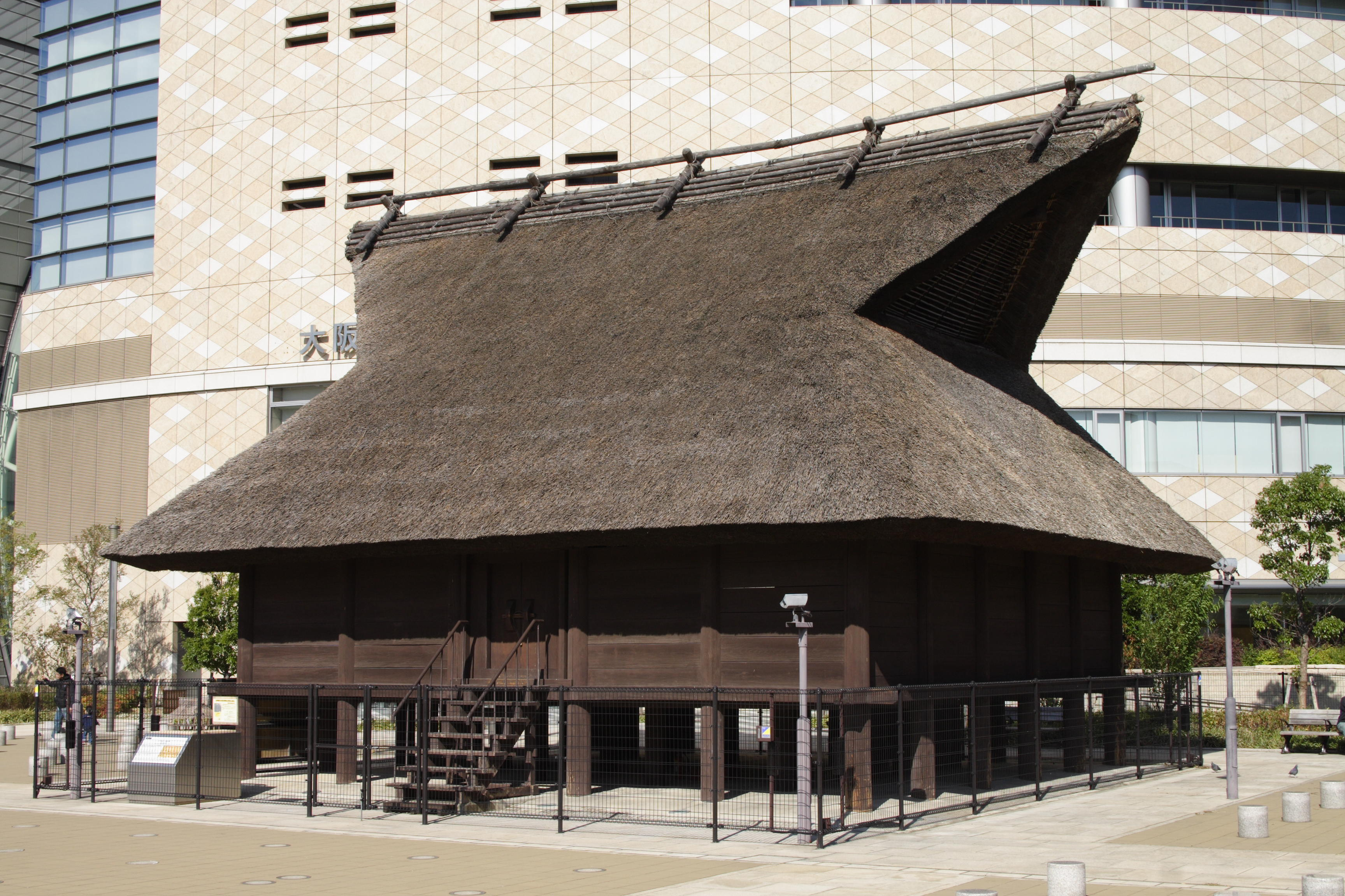 古墳時代の高床式倉庫(大阪歴史博物館, 大阪市, Japan)